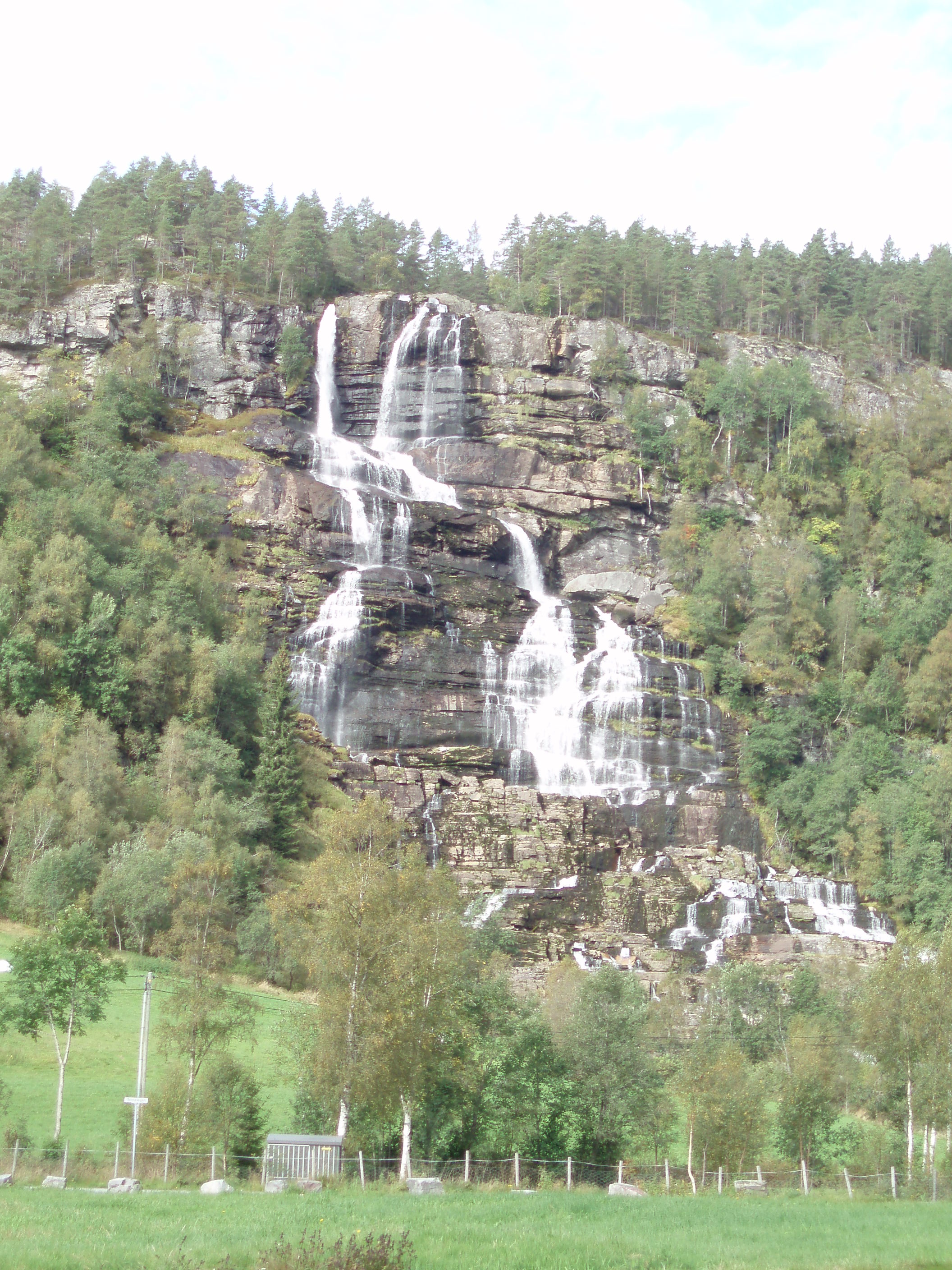 Tvinnefossen at Tvinne, Voss, Norway